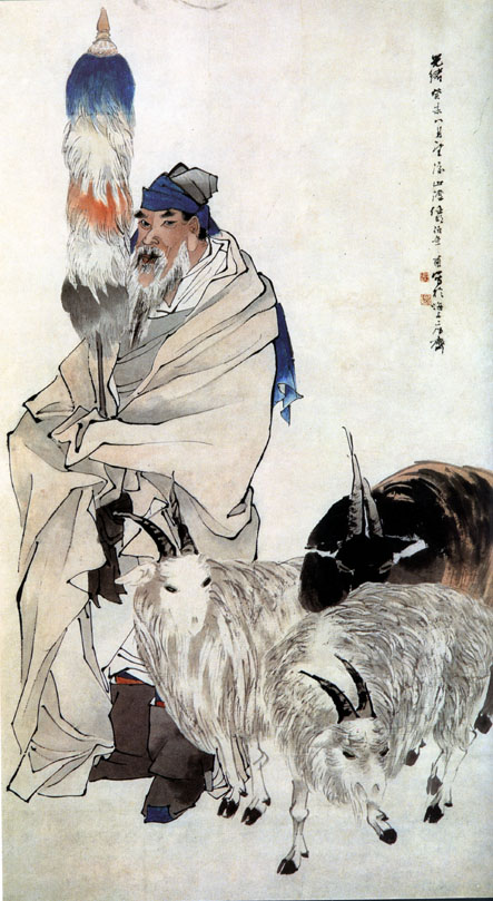 任伯年作品